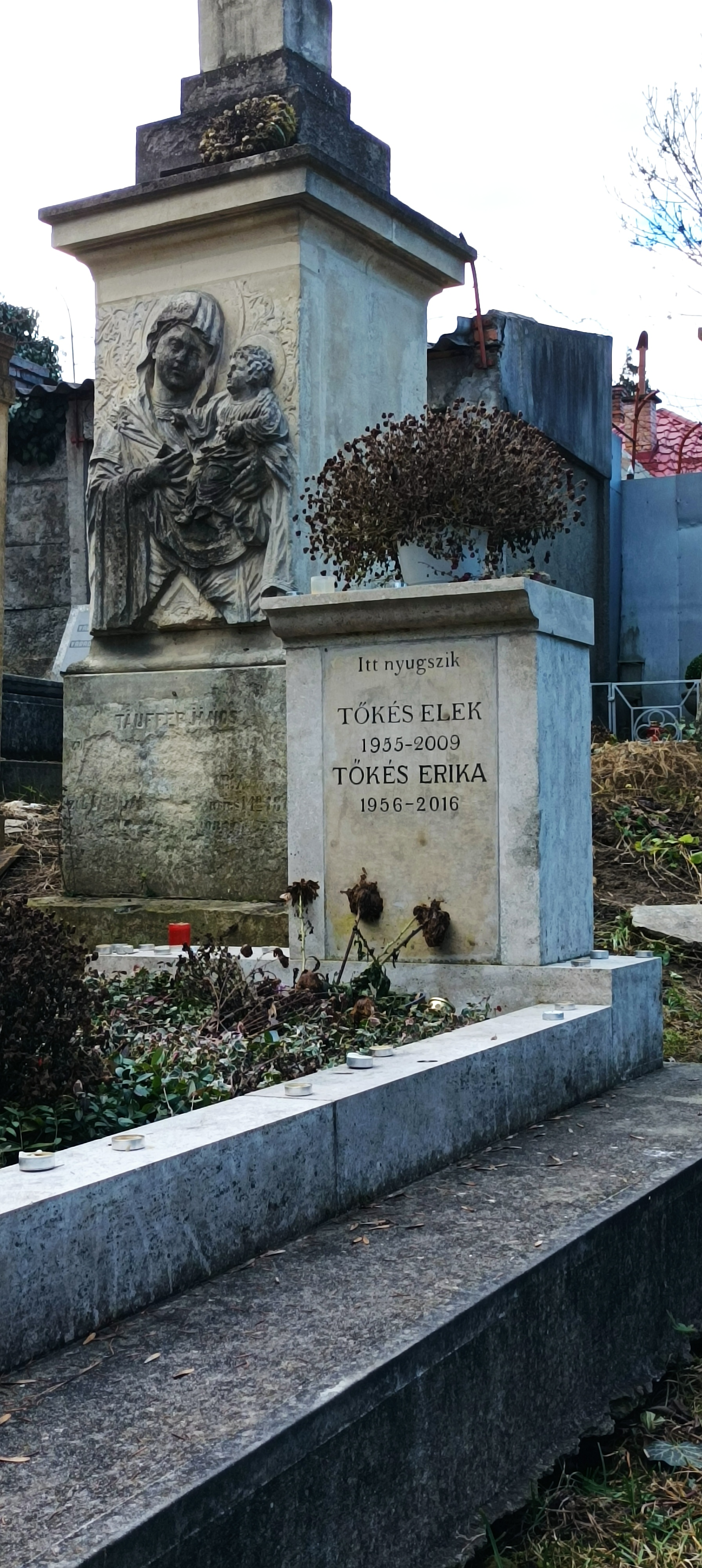 Tőkés Elek magyartanár sírja a Házsongárdi temetőben (Kolozsvár)